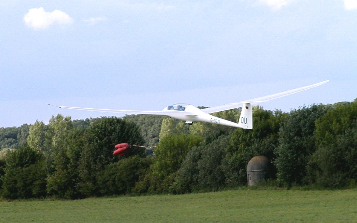 Duo Discus beim Windenstart im August 2001 in Bensheim.